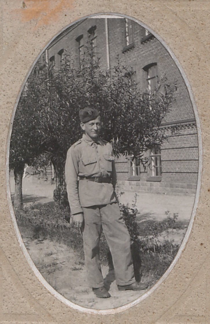 Adam Moraczewski, 1928 r.